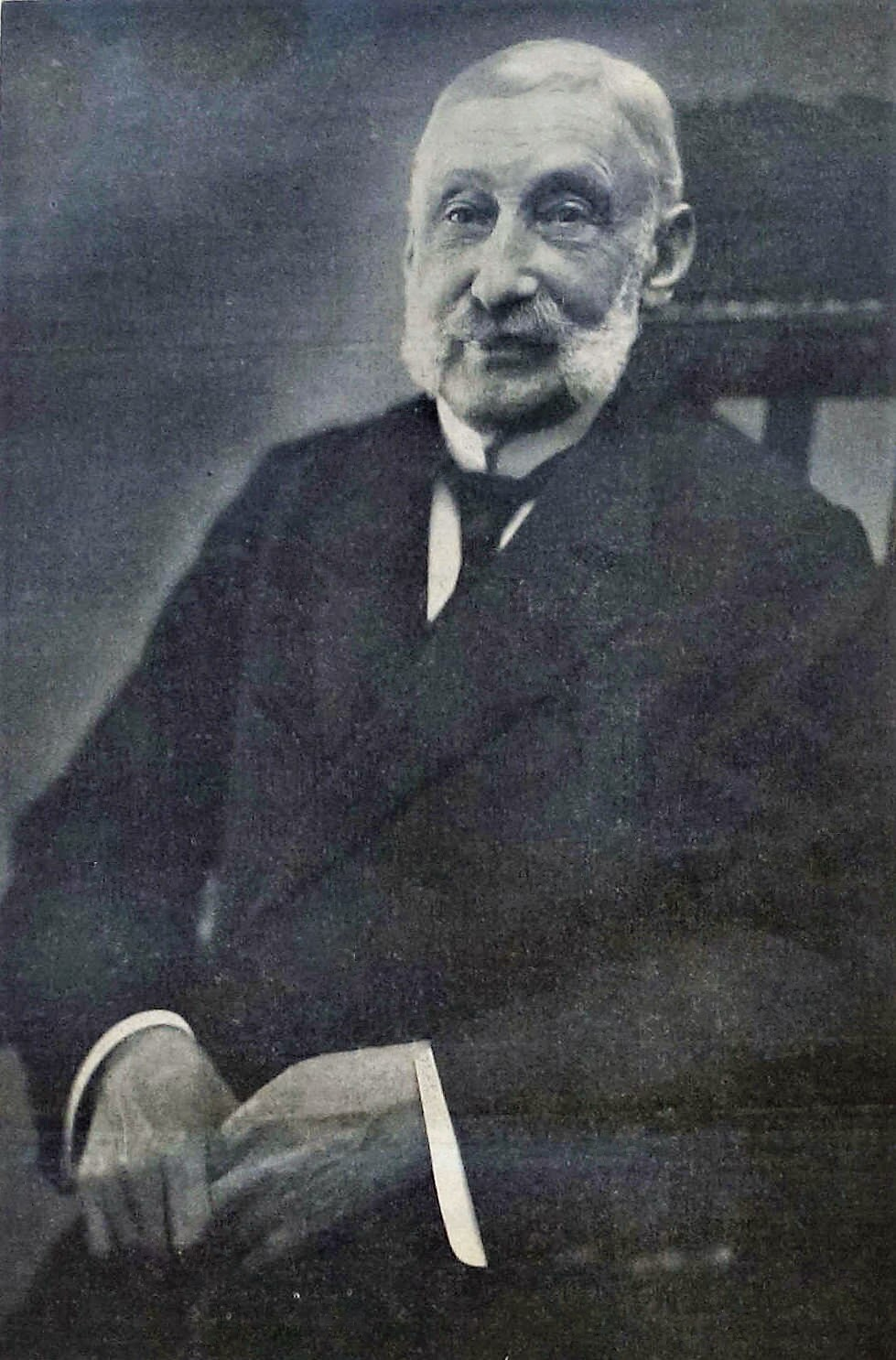 Abraham B. Citroen. Das Unternehmen A. B. Citroen gehörte zu den Begründern der Pelz-Engros-Konfektion[1] und zu den angesehensten Pelzkonfektionsfirmen Berlins, dem ehemaligen Zentrum der deutschen Konfektions- sowie Pelzindustrie. Die Führung der Firma A. B. Citroen war allmählich auf Hendrik Citroen übergegangen und der „alte Citroen“, wir er jetzt allgemein genannt wurde, „widmete sich fast ausschließlich seiner Lieblingsbeschäftigung, der Färberei“. Weit außerhalb, am Schlesischen Tor hatte er eine Pelzveredlungsfabrik eröffnet „und schuftete dort unermüdlich wie der geringste seiner Arbeiter an den Bottichen, um den Geheimnissen der Farbe auf die Spur zu kommen“. Trotz großen Fleißes kam A. B. Citroen nicht voran, seine Versuche kosteten viel Geld und große Partien verdorbener Felle mussten ersetzt werden. Er suchte nach einer Nerzfarbe, die haltbar war und immer gleichmäßig aus dem Farbbad hervorkommen sollte. Es kam zu großen Auseinandersetzungen mit seinem Neffen, der die Verluste nicht länger tragen wollte. Da A. B. Citroen die Fabrik nicht aufgeben wollte, trennten sich die Partner und die Färberei erhielt den Namen Abraham Citroen.